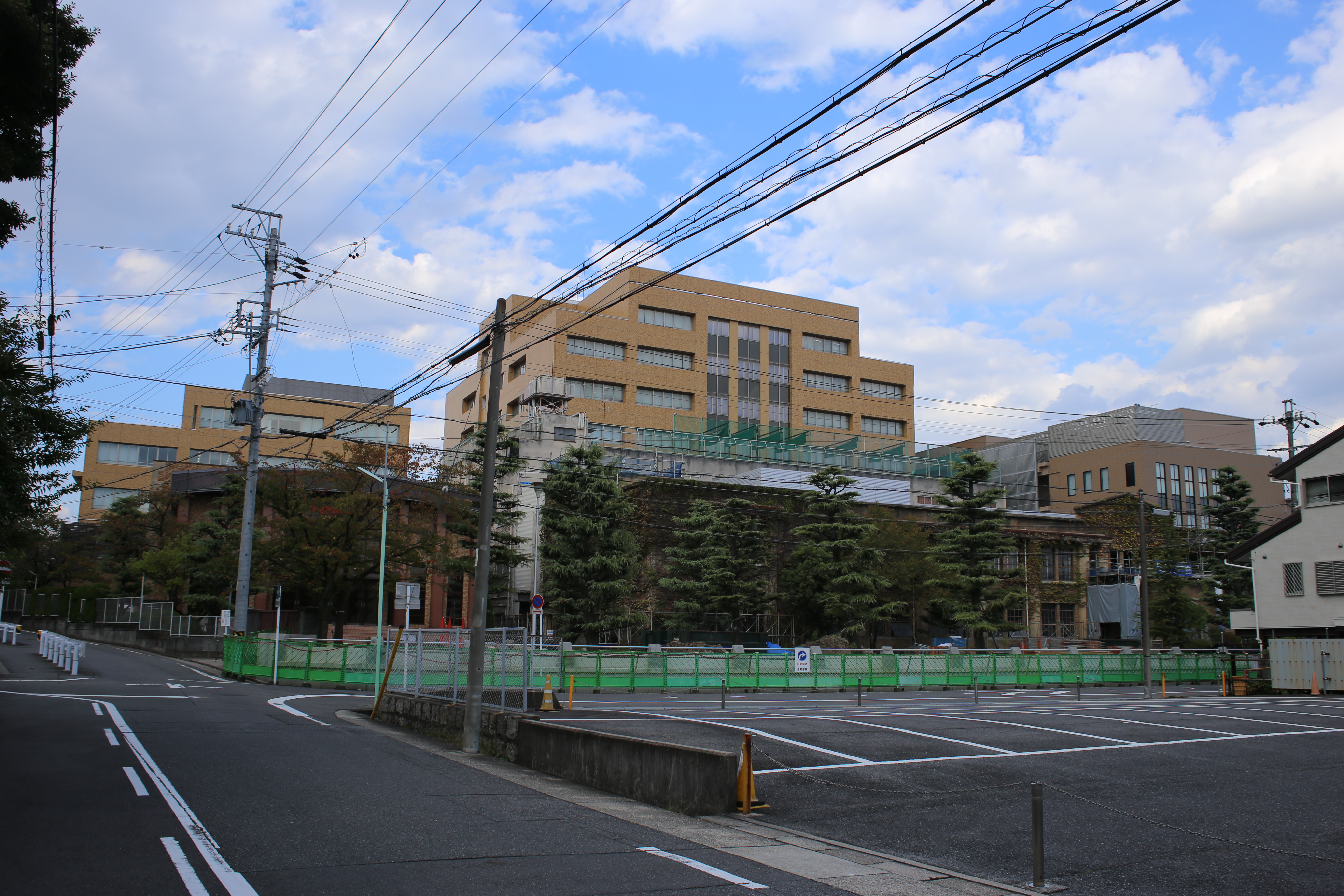 名古屋市千種区楠元町の愛知学院大学楠元キャンパスを西側公道南側より撮影